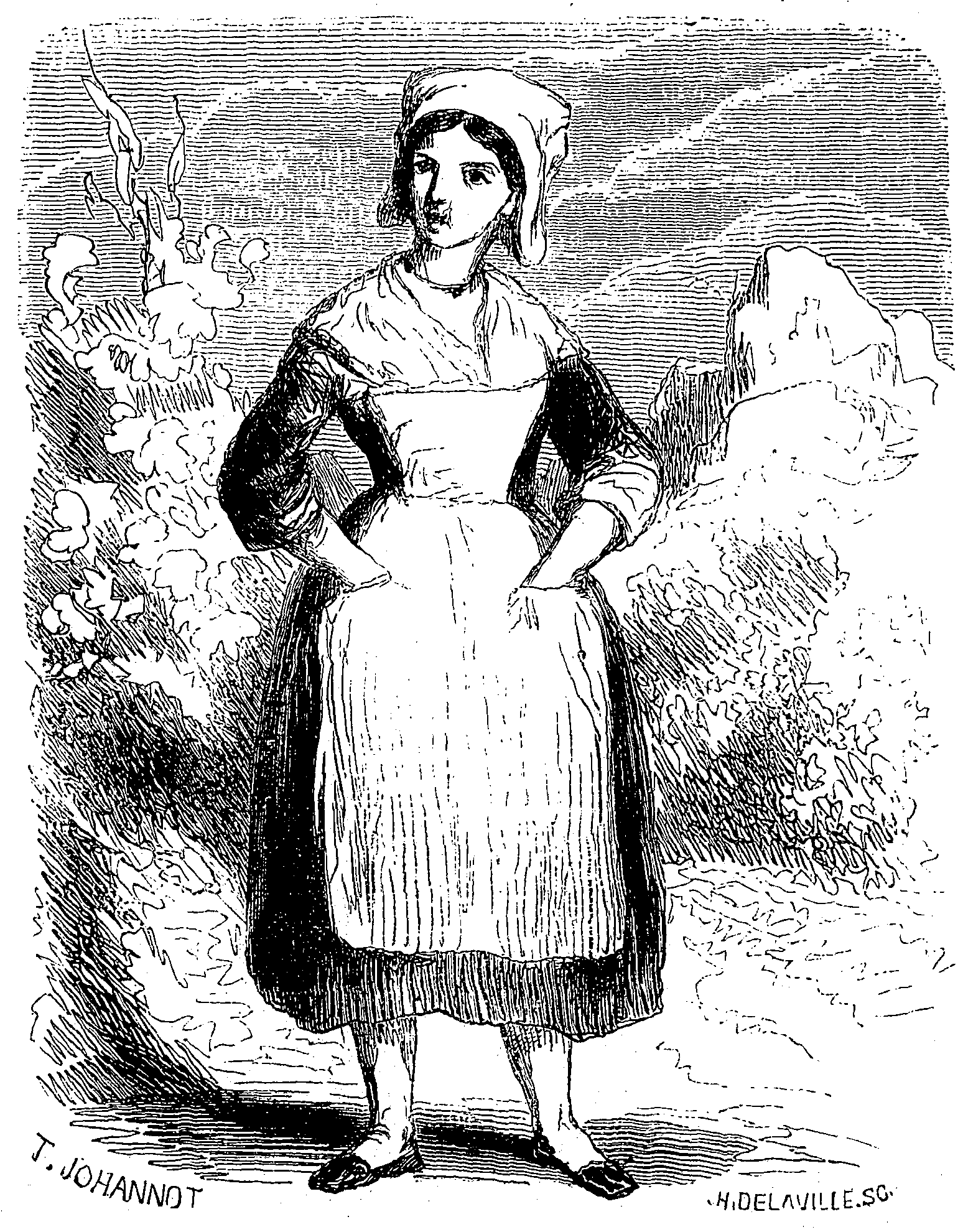 Une paysanne creusoise. Dessin en noir et blanc de Tony Johannot (gravure de A. Delaville) pour les Œuvres illustrées de George Sand, Jeanne, Paris, Jules Hetzel éditeur, volume 3, 1853.